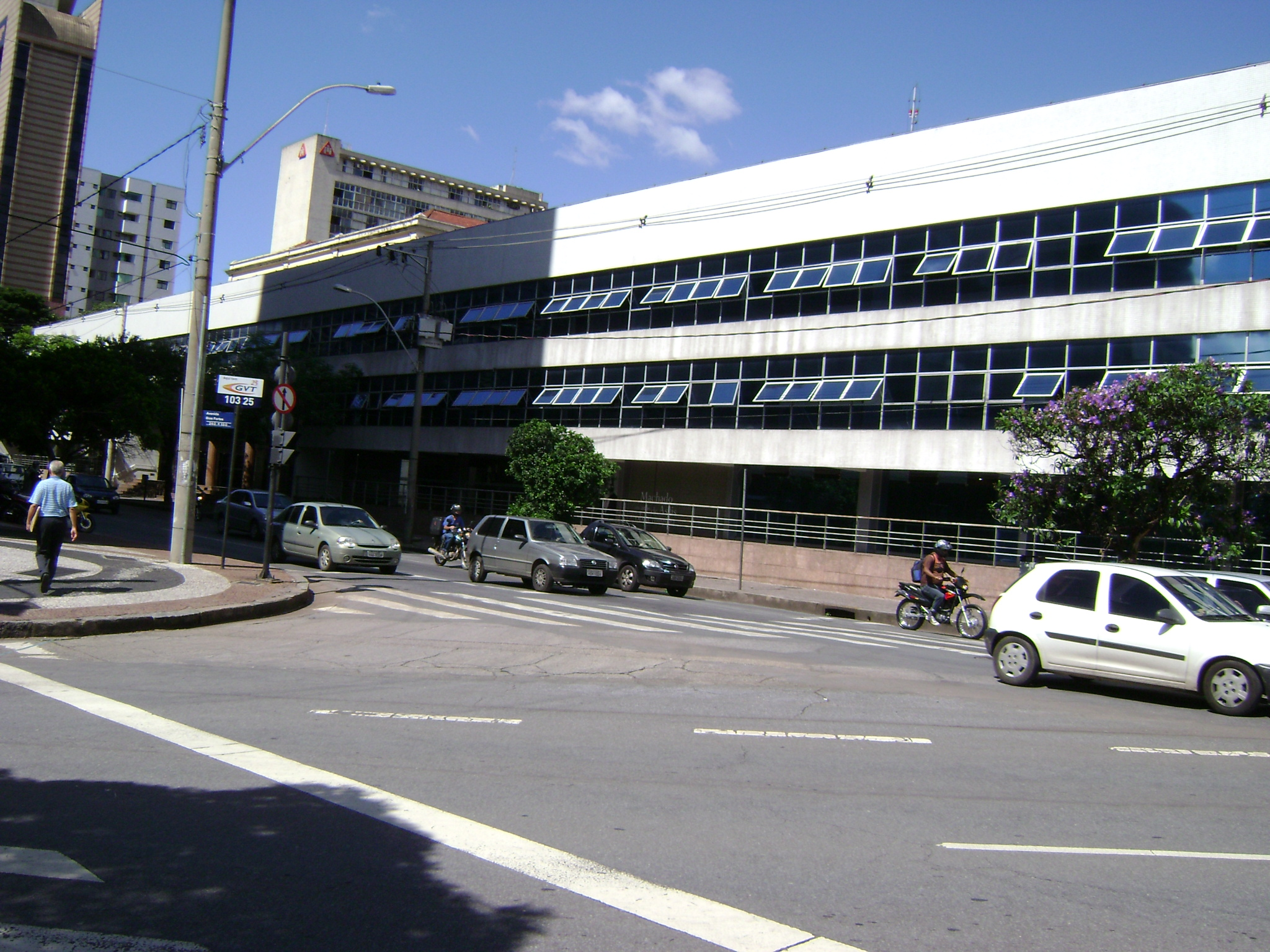 Anexo da Biblioteca Pública Estadual Luiz de Bessa